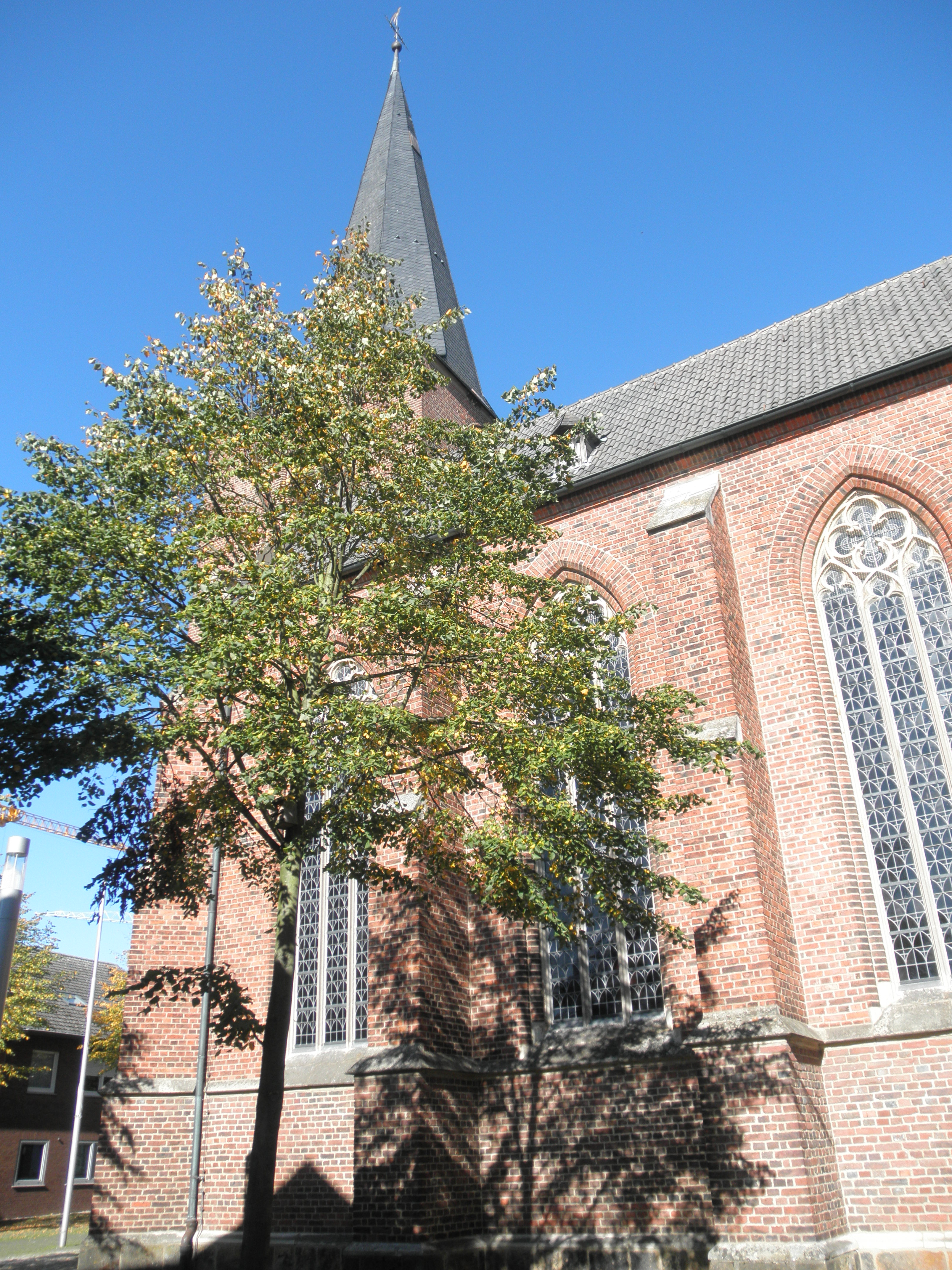 preĝejo St. Martin en Raesfeld